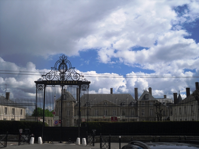 L'école privée catholique Saint-Charles d'Athis-Mons (91)